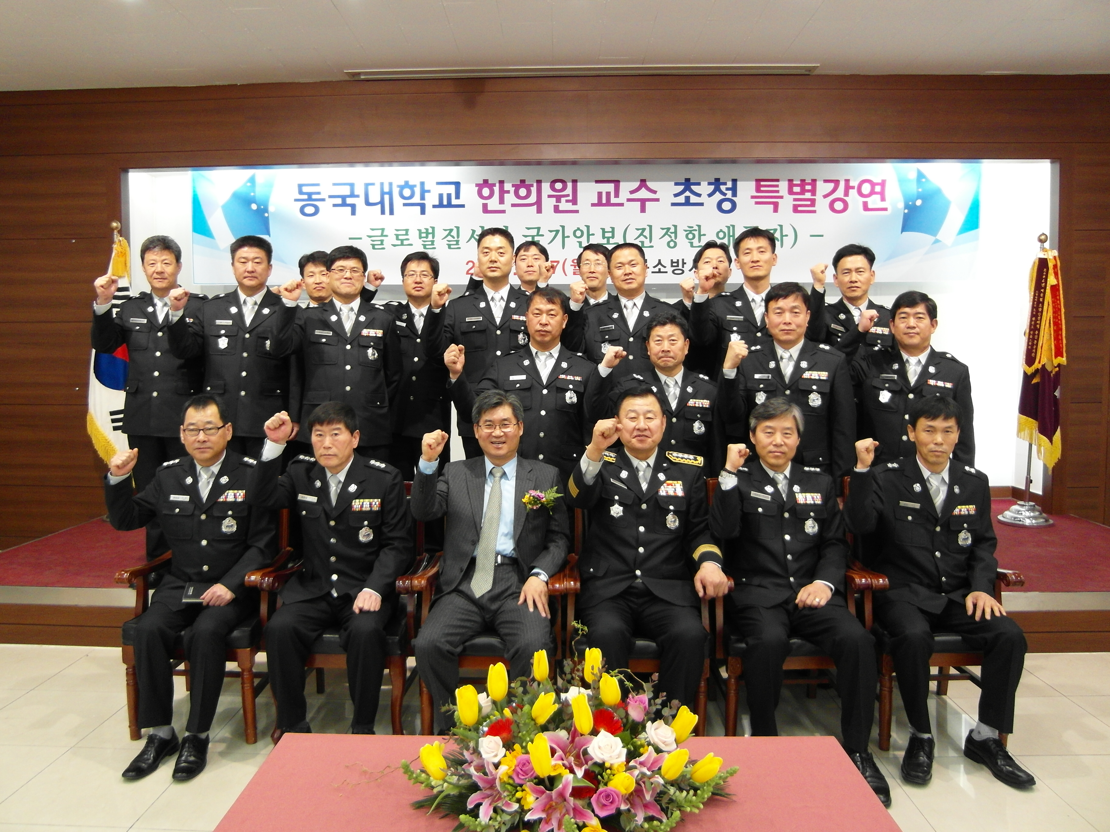 Photos of Gangwon-do Fire and Rescue Service